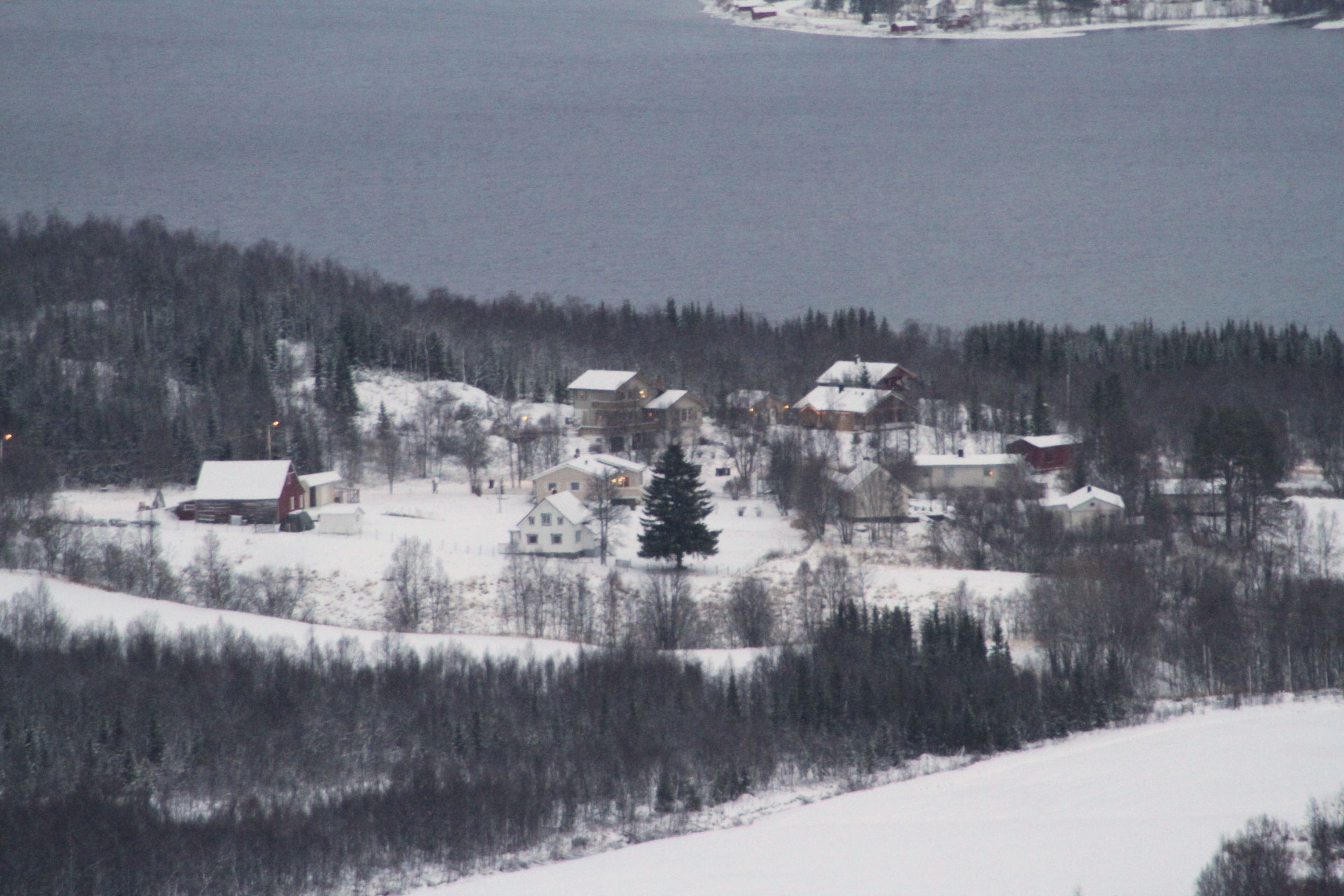 Vinter bilde av Skavmodalen tatt fra Rødbergan